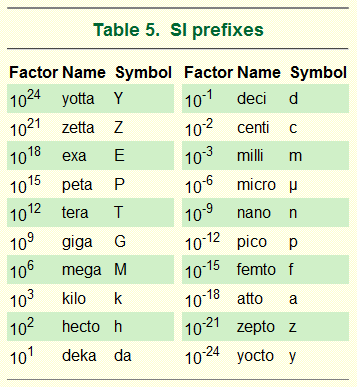 hecto is dus Pascal * 10^2 1013 hPa = 101300Pa